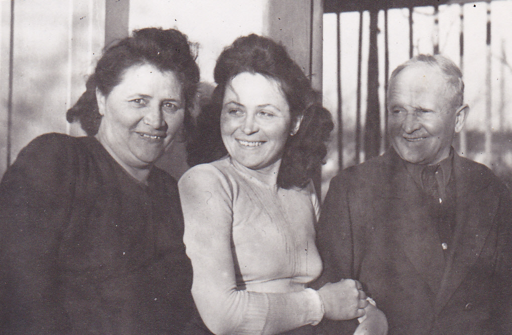 links Adele und rechts Hans Felbermayer, März 1949